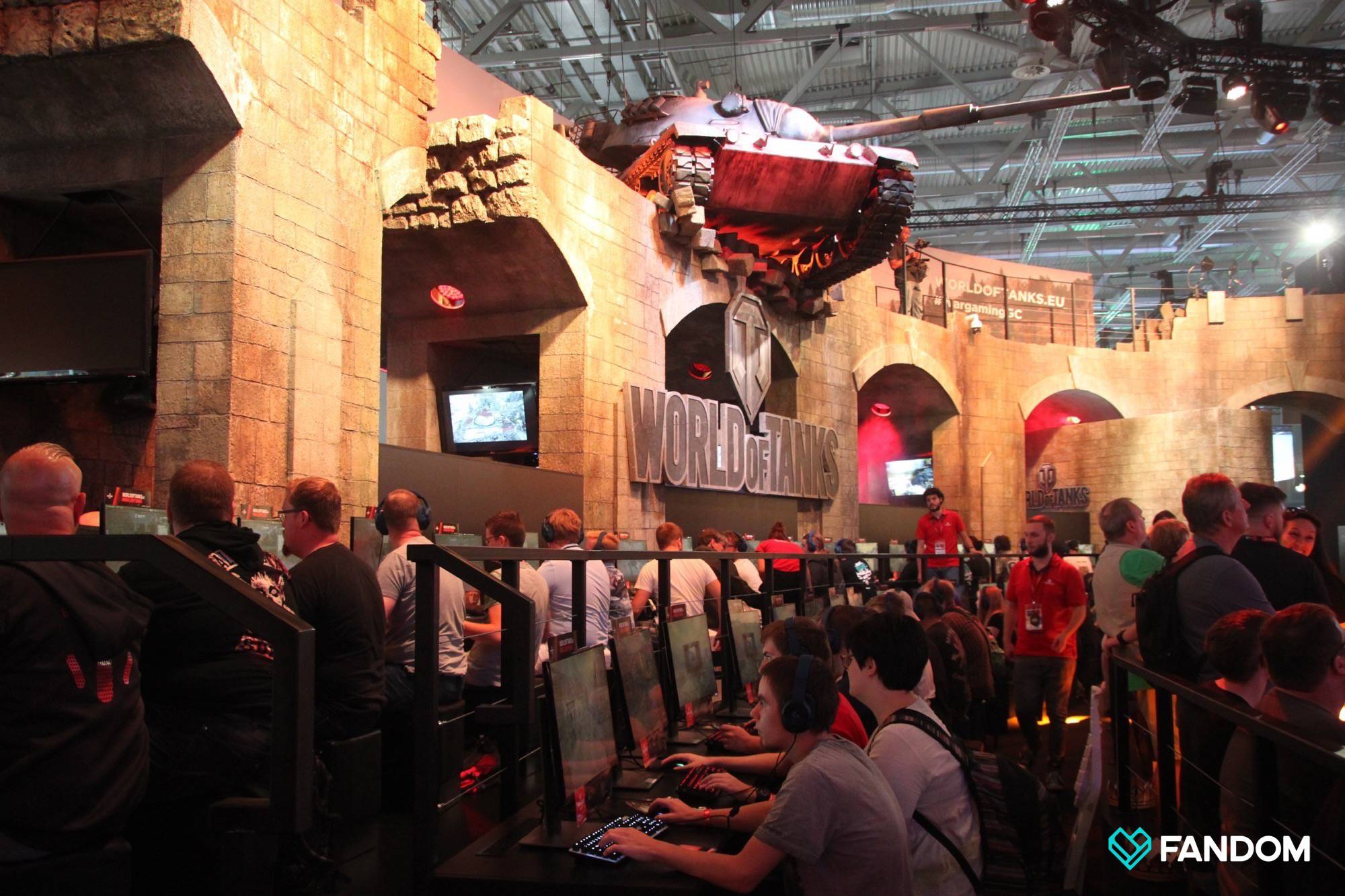 FANDOM für euch auf der gamescom unterwegs... Sonstige Neuigkeiten